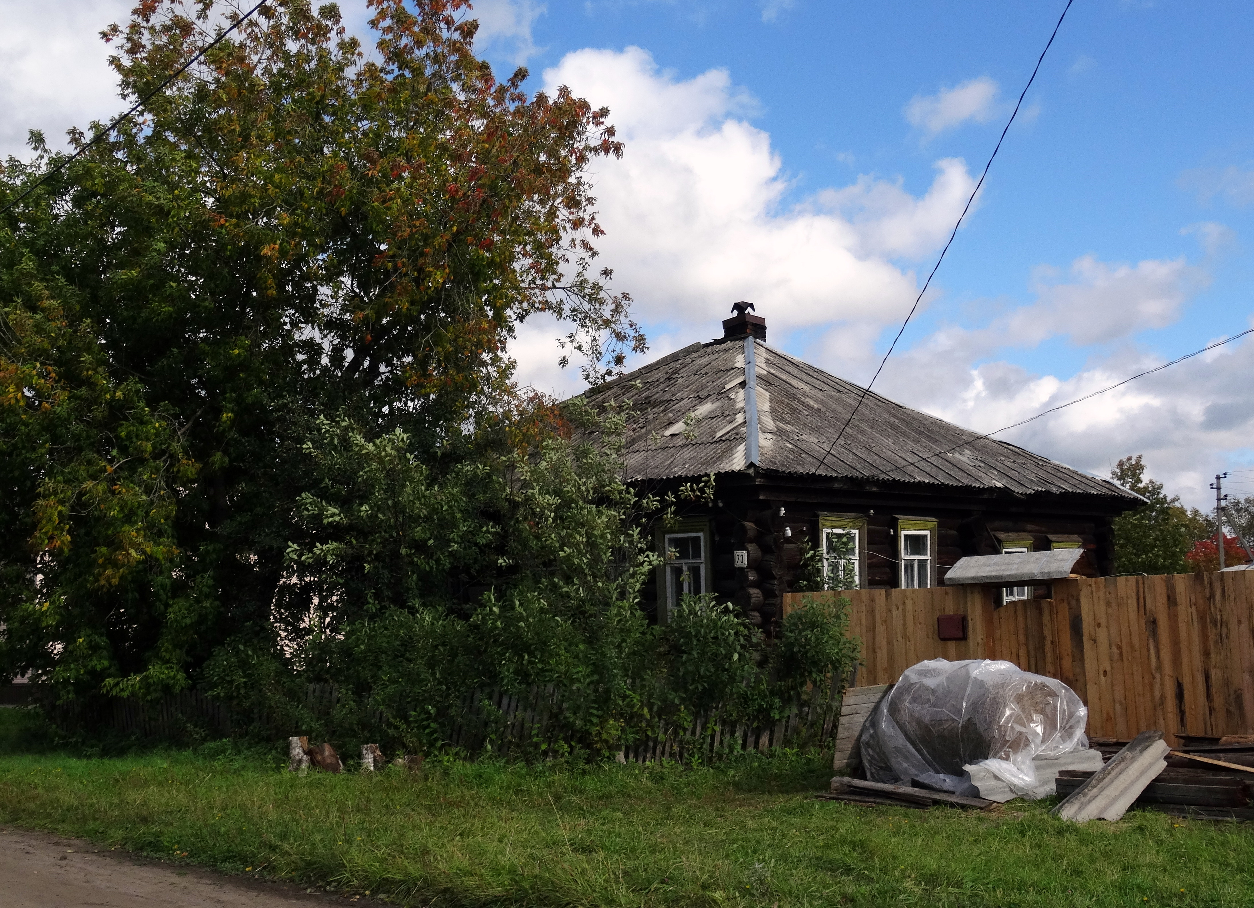 Дом партизанки Усатовой: улица Петра Смирнова, 73, Белая Холуница, Белохолуницкий район, Кировская область